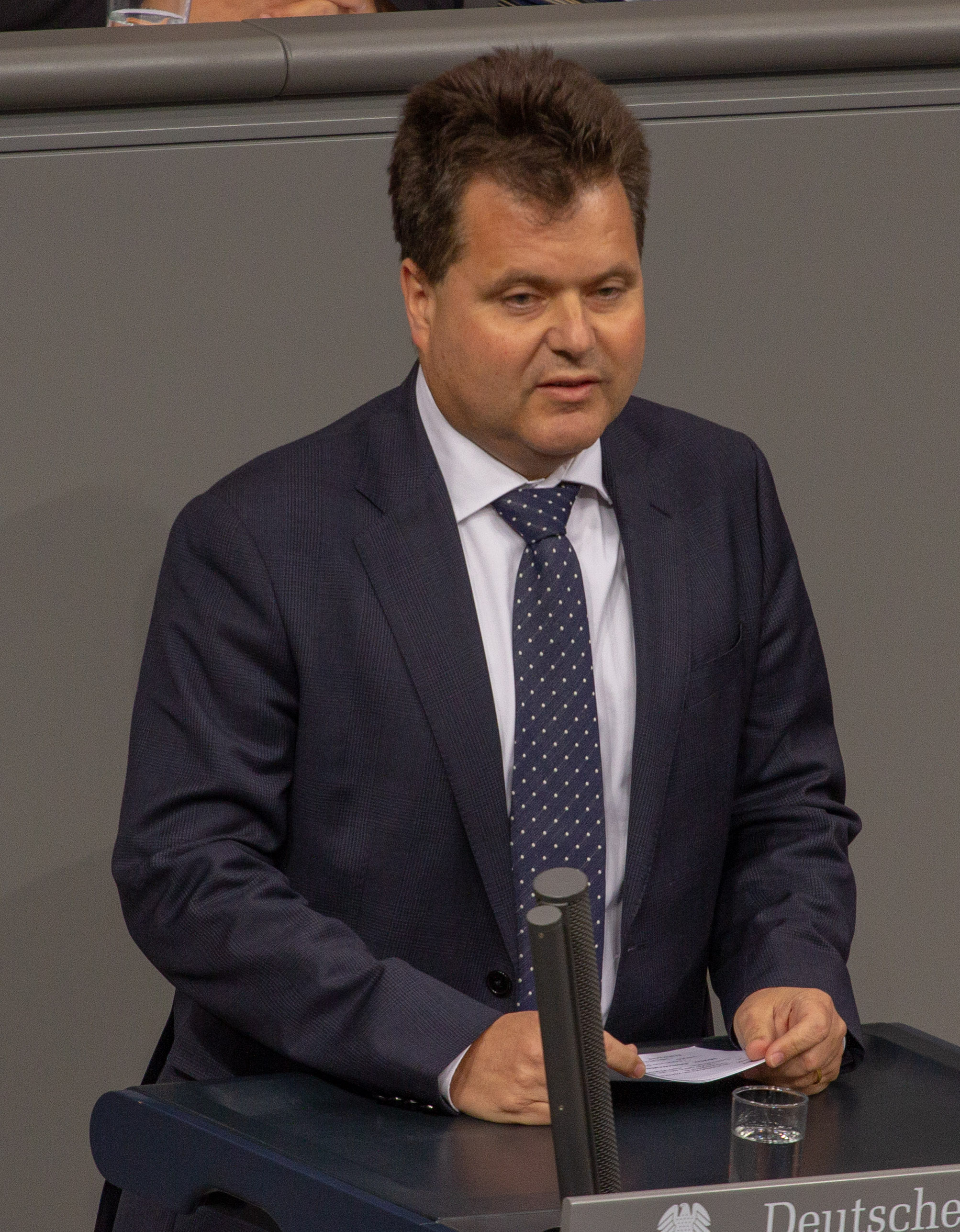 Jürgen Dusel, während einer Plenarsitzung am 11. April 2019 in Berlin.